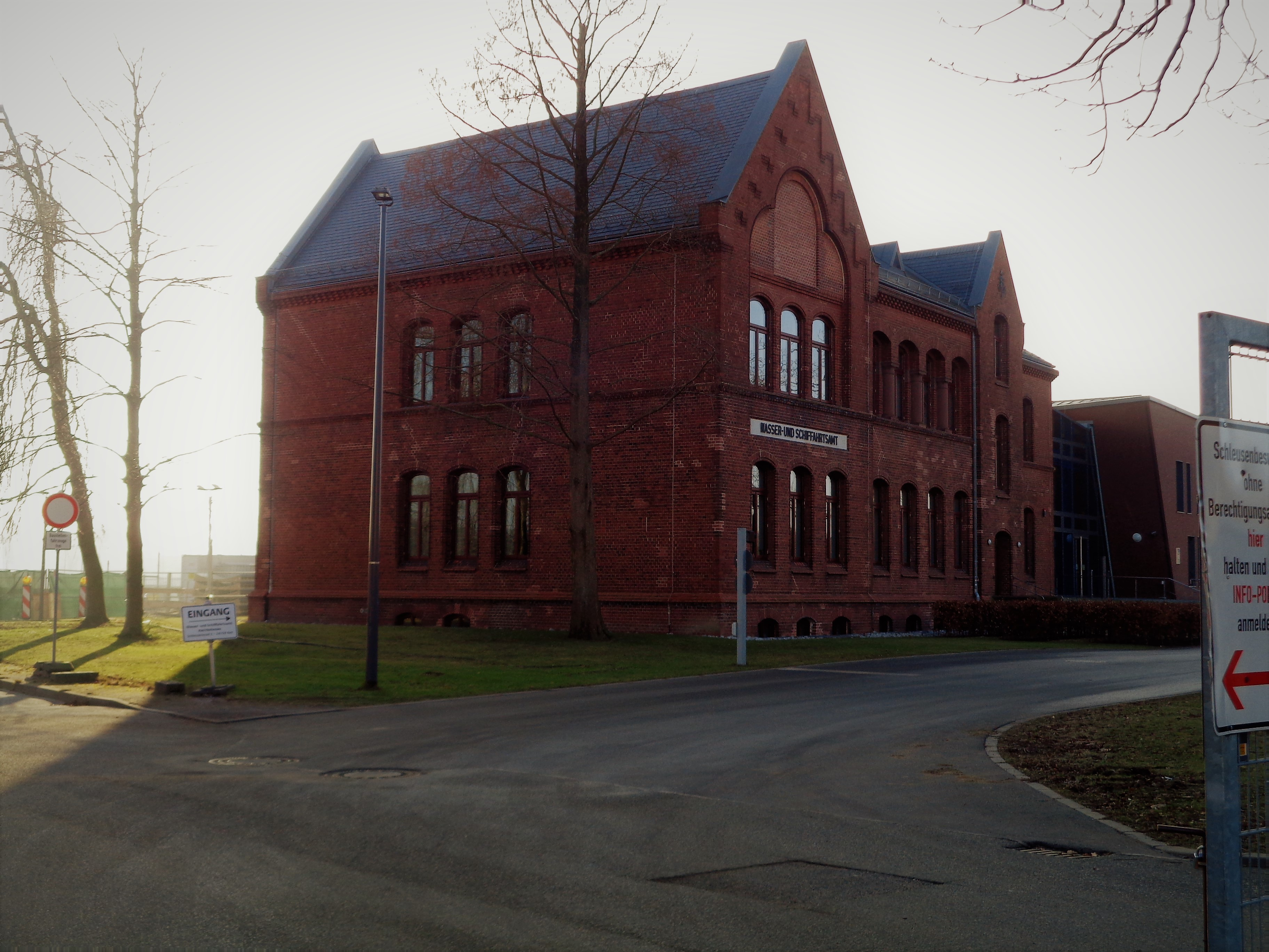 Das ehemalige Kaiserliche Hafenamt (heutiges Wasser- und Schiffahrtsamt) auf der Schleuseninsel 2 im Kieler Stadtteil Holtenau.